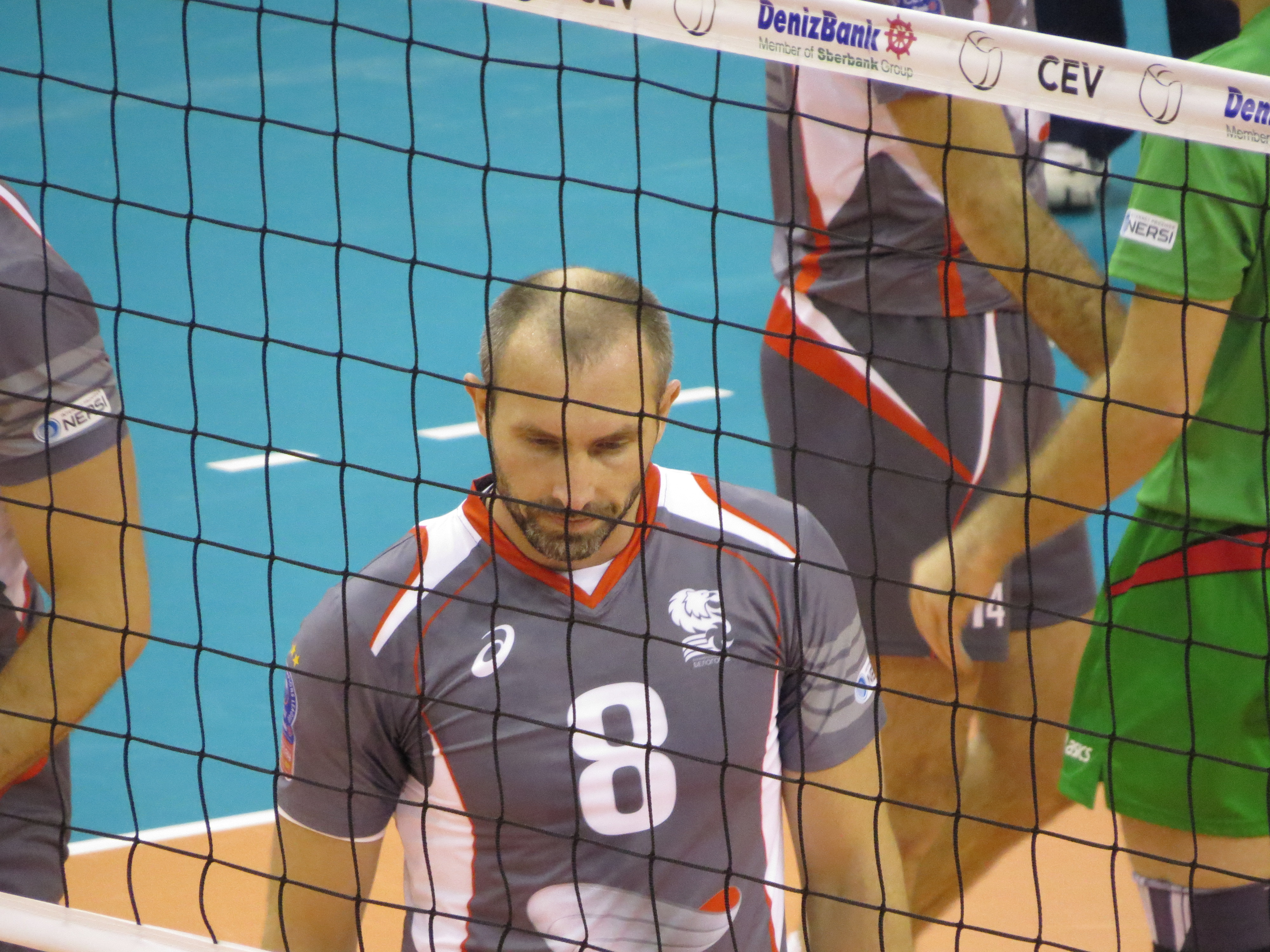 Photo réalisée lors du match de ligue des champions de volley entre le Paris Volley et le Lokomotiv Belgorod. Victoire de Belgorod 3-0 8:TETYUKHIN Sergey